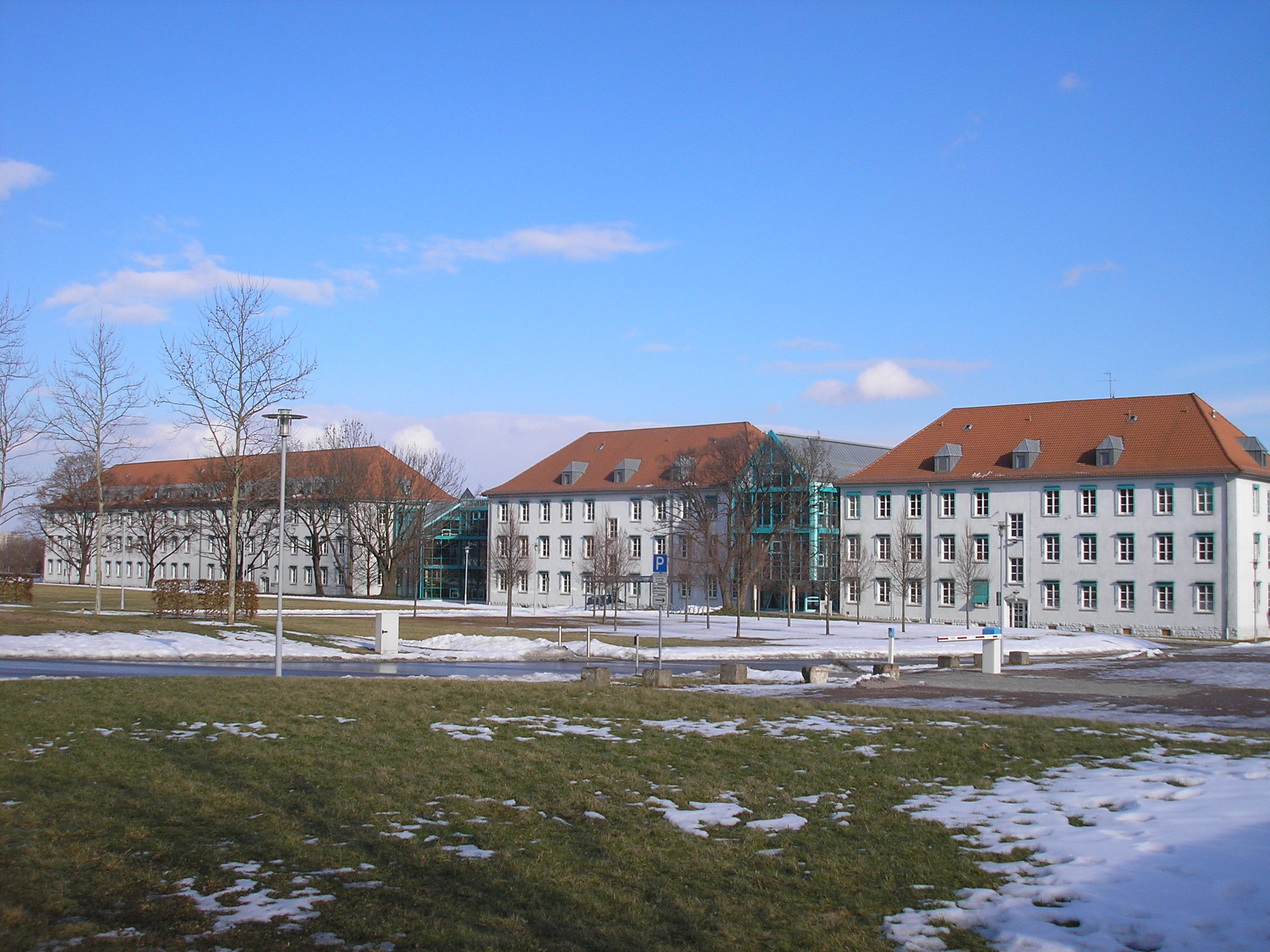 Das Finanzministerium in Erfurt.